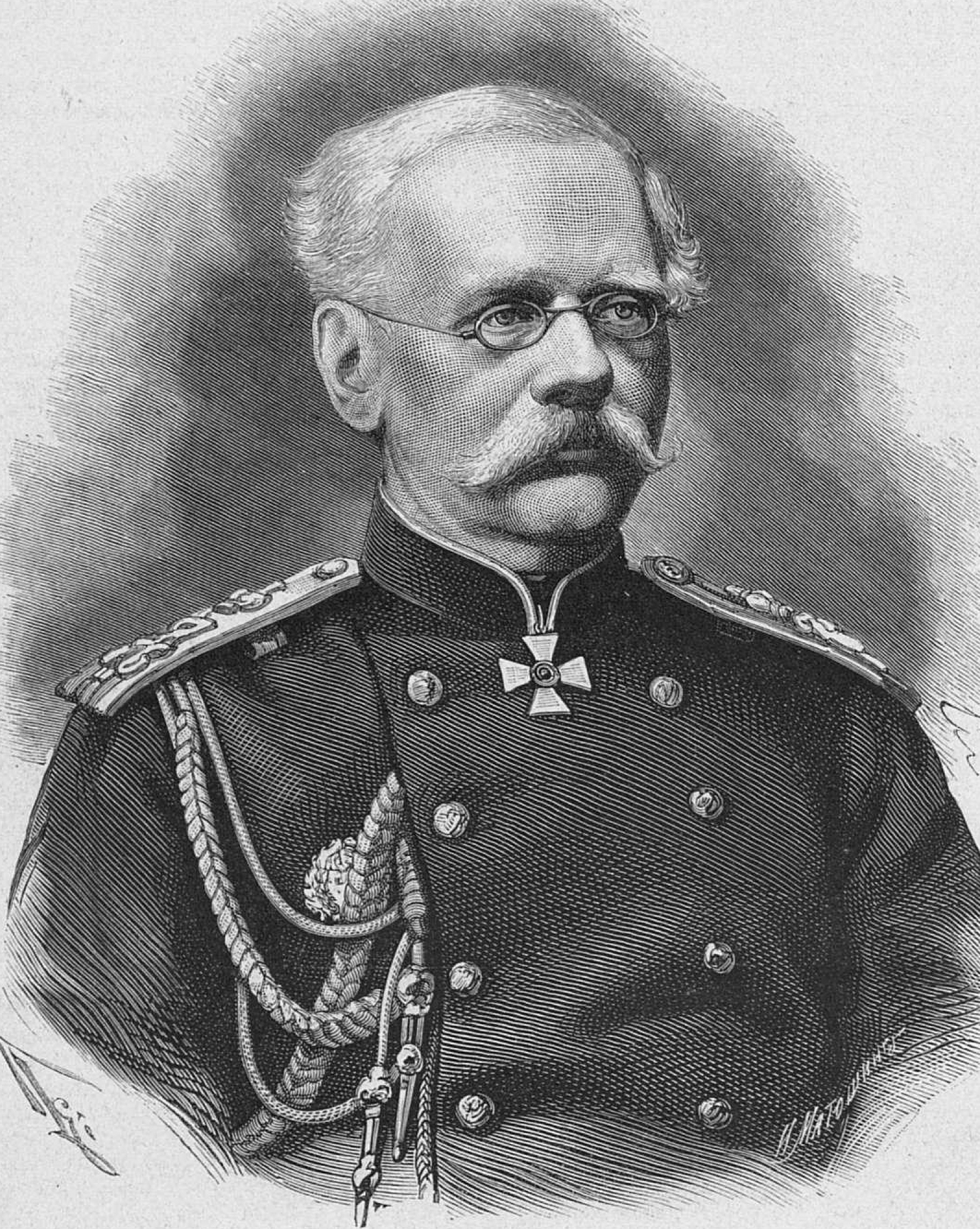 Генерал Крыжановский Николай Андреевич